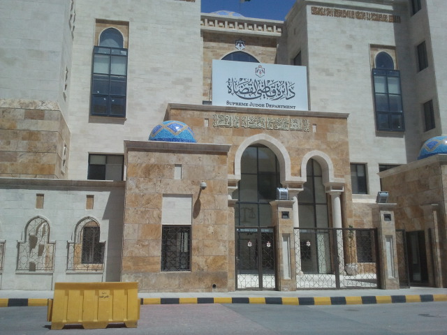 دائرة قاضي القضاة في الأردن